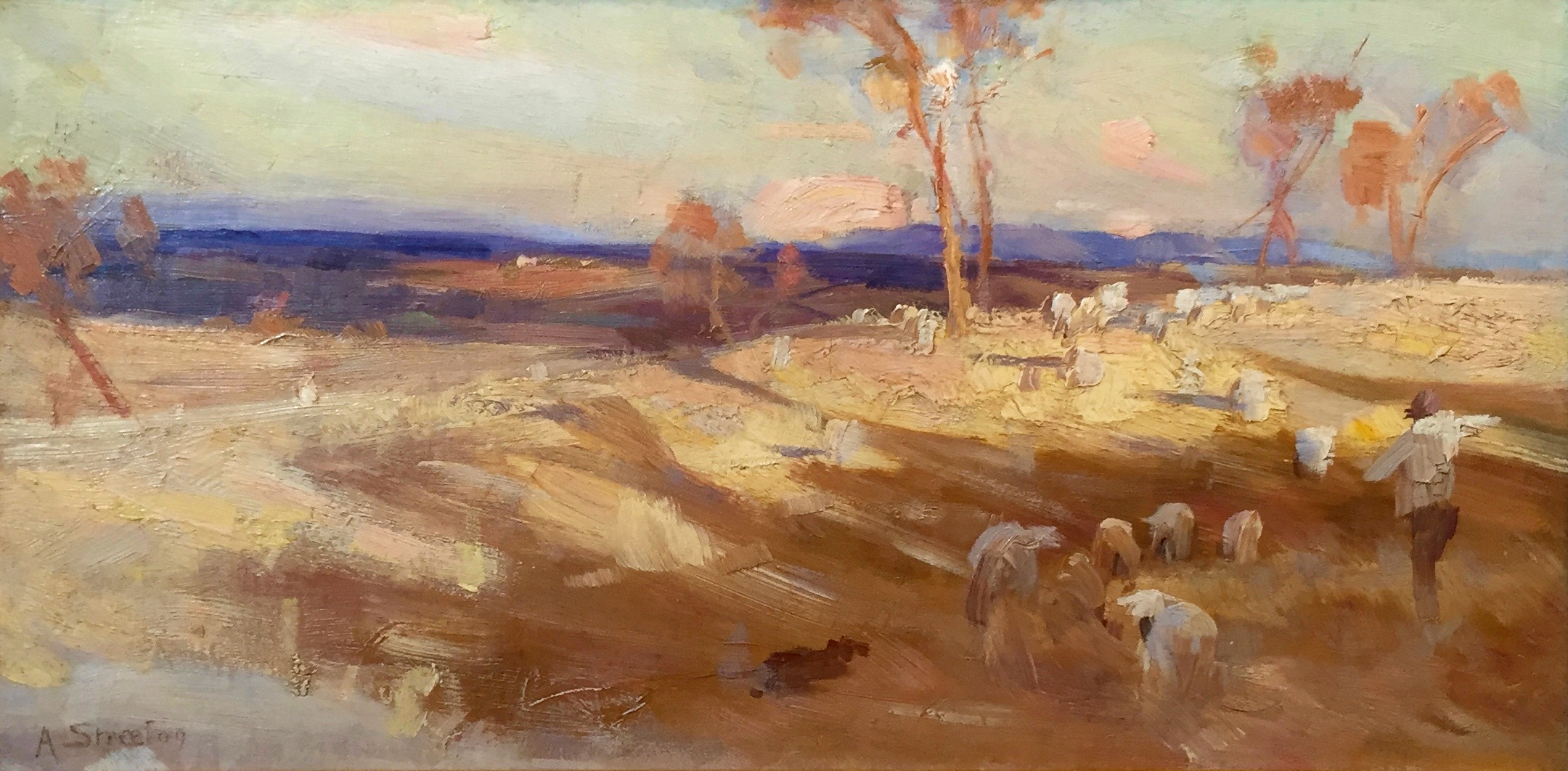 Impression for ‘Golden Summer'